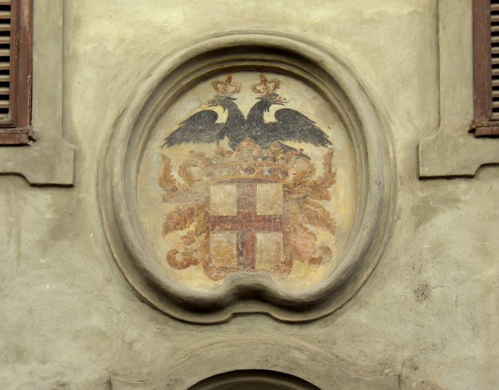 Lo stemma cittadino di Lodi dipinto all'ingresso dell'ex convento di San Paolo. Probabilmente di età asburgica (XVIII sec.).